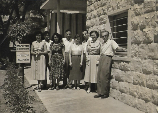 חברי מערכת כתב העת "דברי הימים"